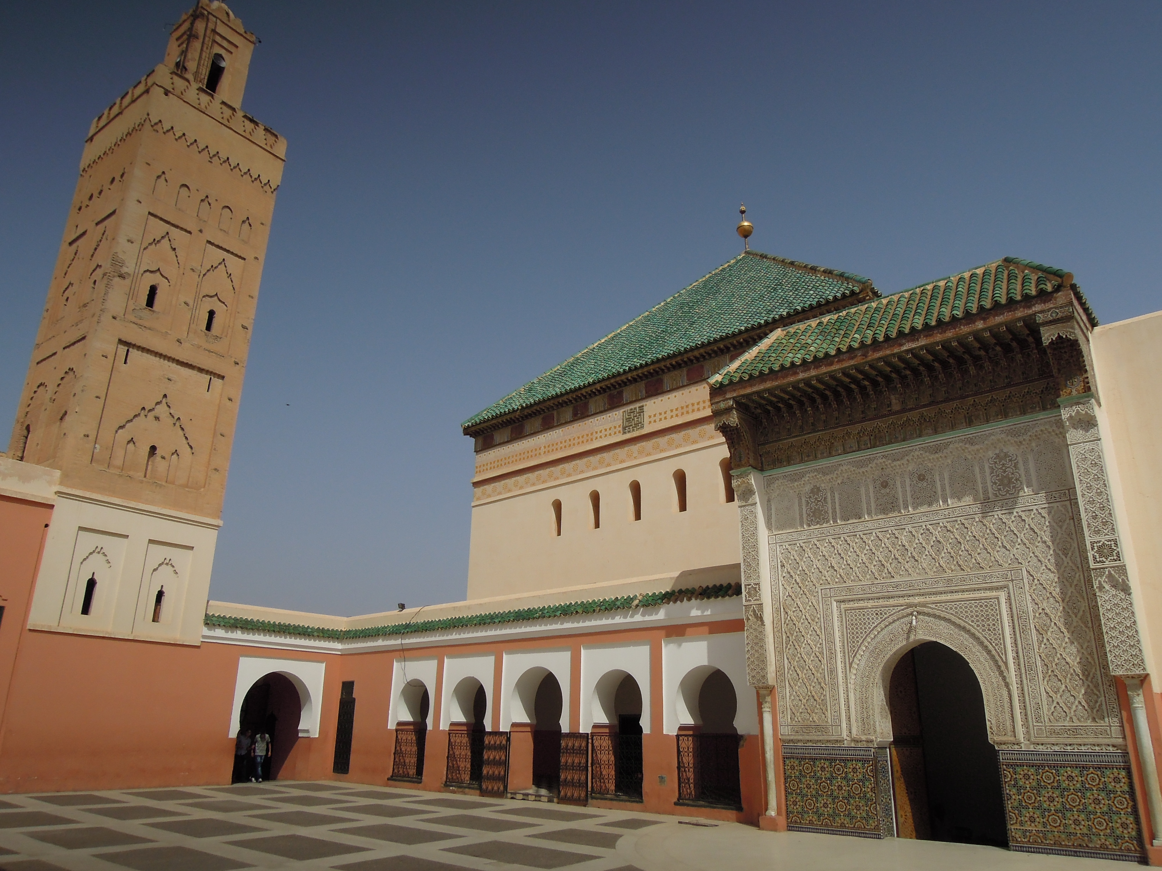 Vue du minaret, du mausolée, de l'entrée du mausolée ainsi que de la cour extérieure ("dass") de la Zaouïa de Sidi Bel Abbès